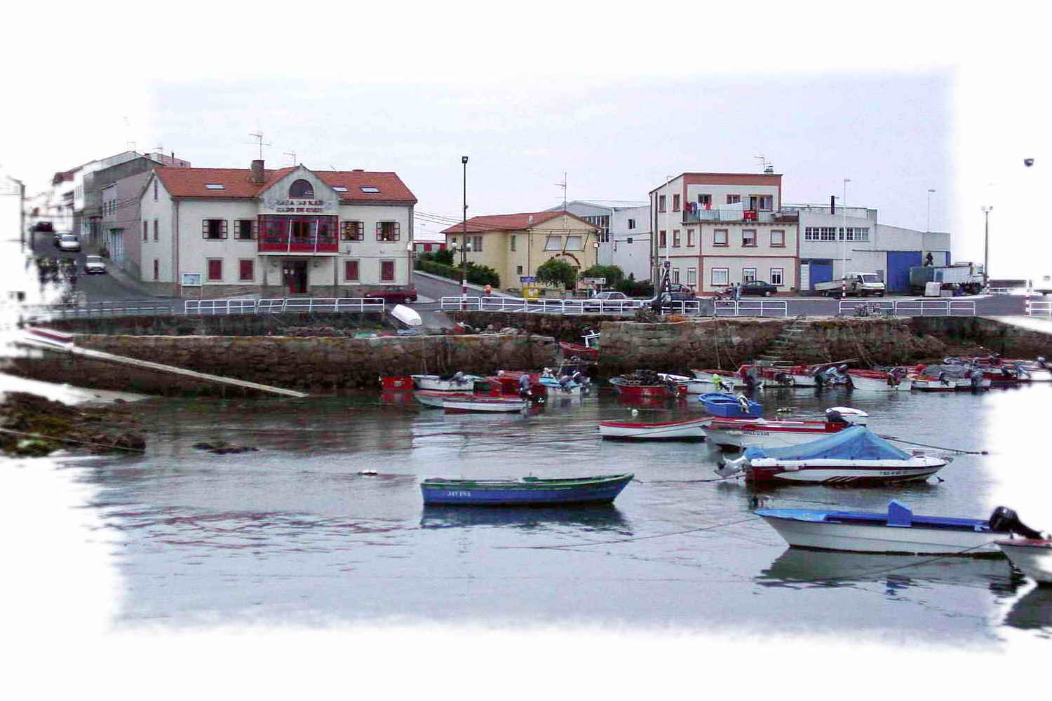 Boiro - Galicia - España (Spain)